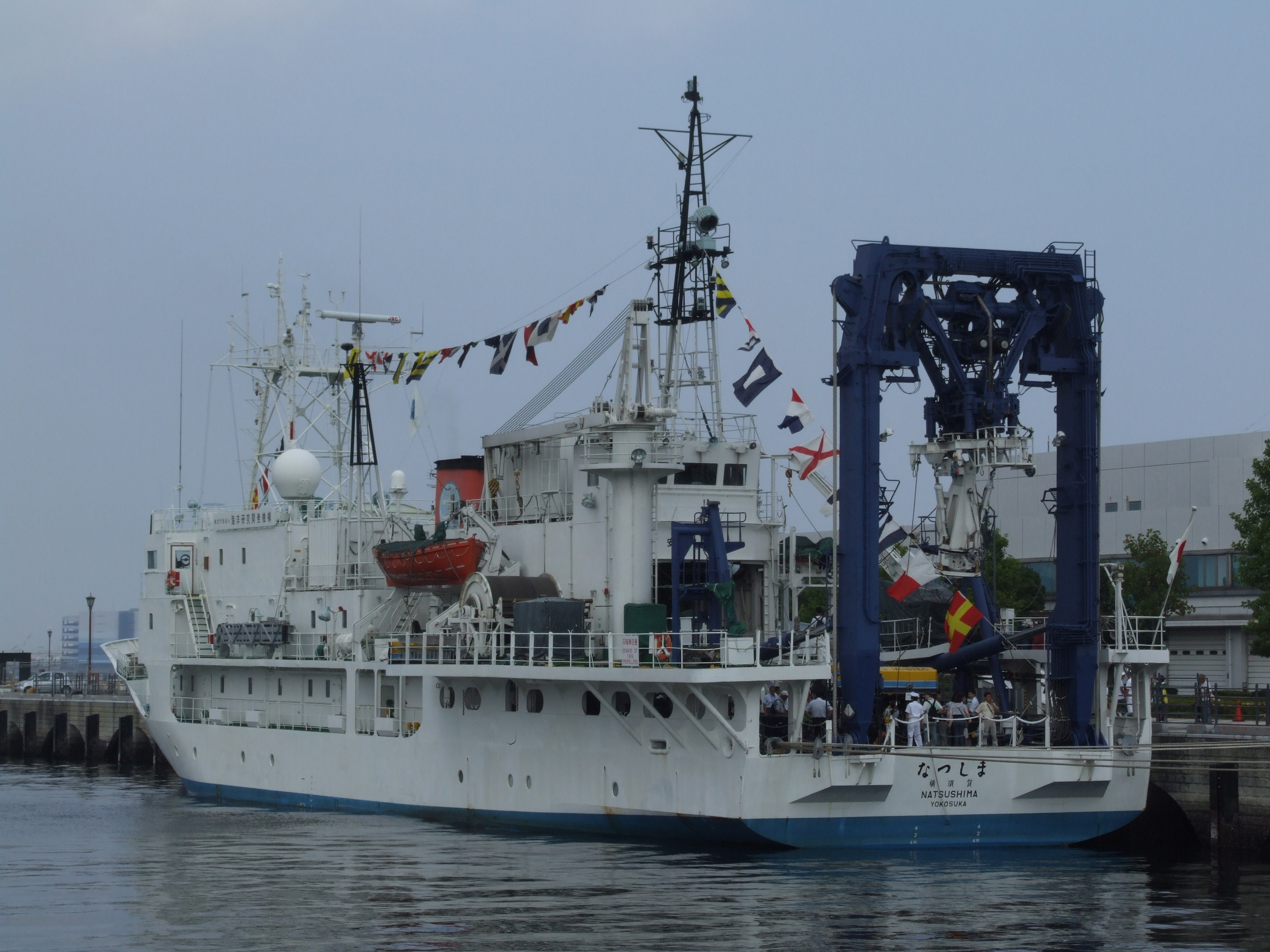 なつしま（横浜港開港150年でのイベントでの横浜港で撮影）